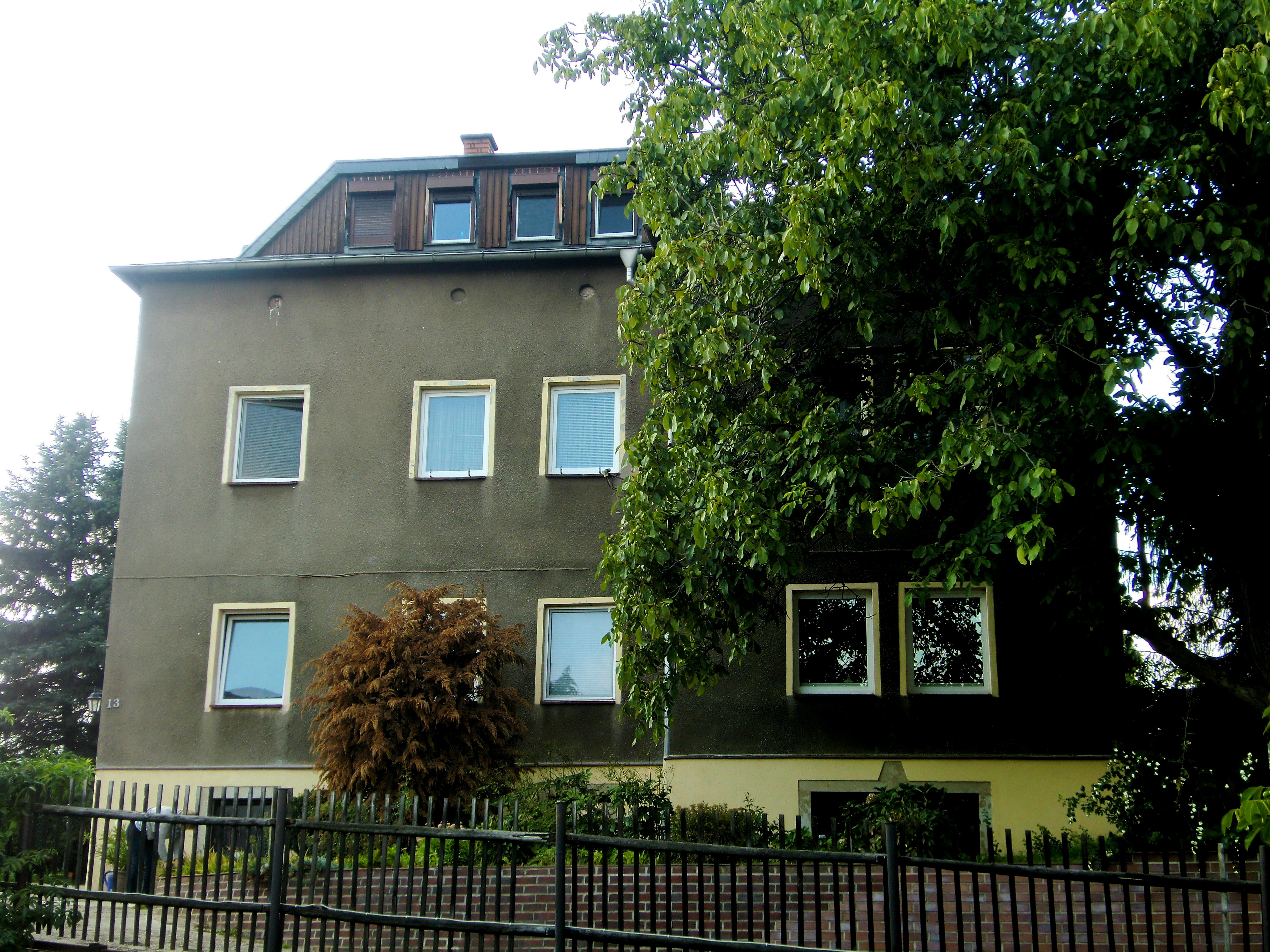 Serkowitz, Altserkowitz 13, ehemalige Talmühle am Lösnitzbach, später Gaststätte und heute Wohnhaus.